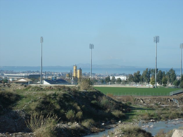 Fotis Aravantinos football center Patras GreeceΑθληξτικό κέντρο Φώτης Αραβαντινόε, Θύελλα Πατρών .